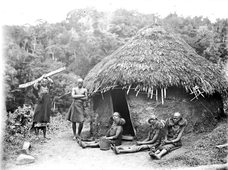 Waschambaa vor ihrer Hütte